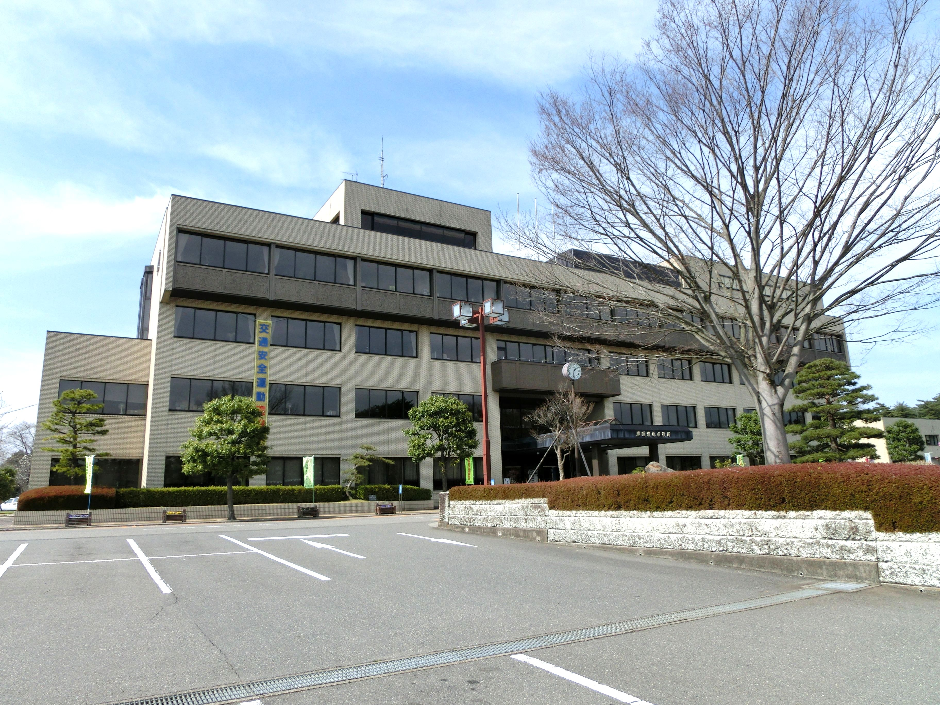 那須塩原市役所